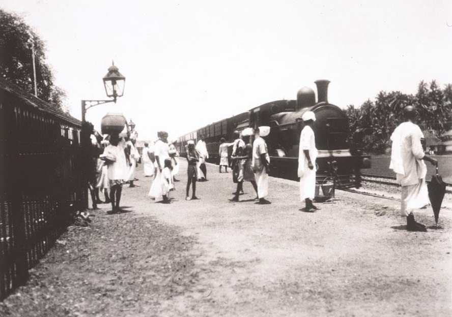 ഇപ്പോൾ തിരുനാവായ സ്റ്റേഷൻ എന്നറിയപ്പെടുന്നു.